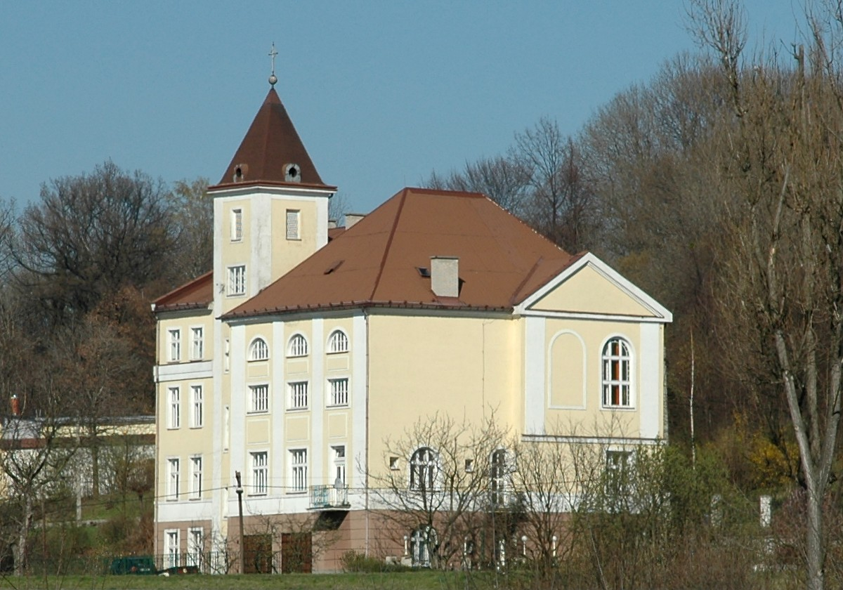 Budova evangelického sboru v Orlové